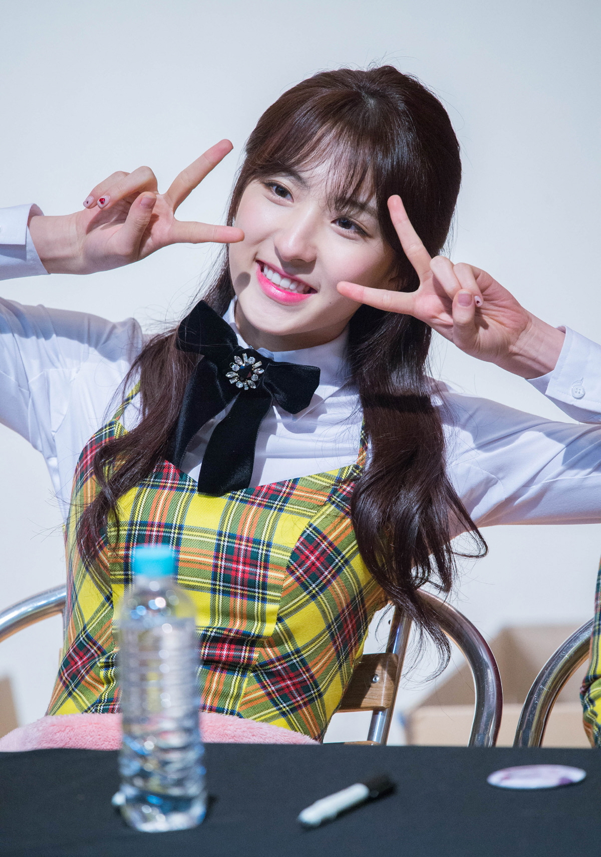 170115 강남팬싸인회 우주소녀 은서 성소 여름